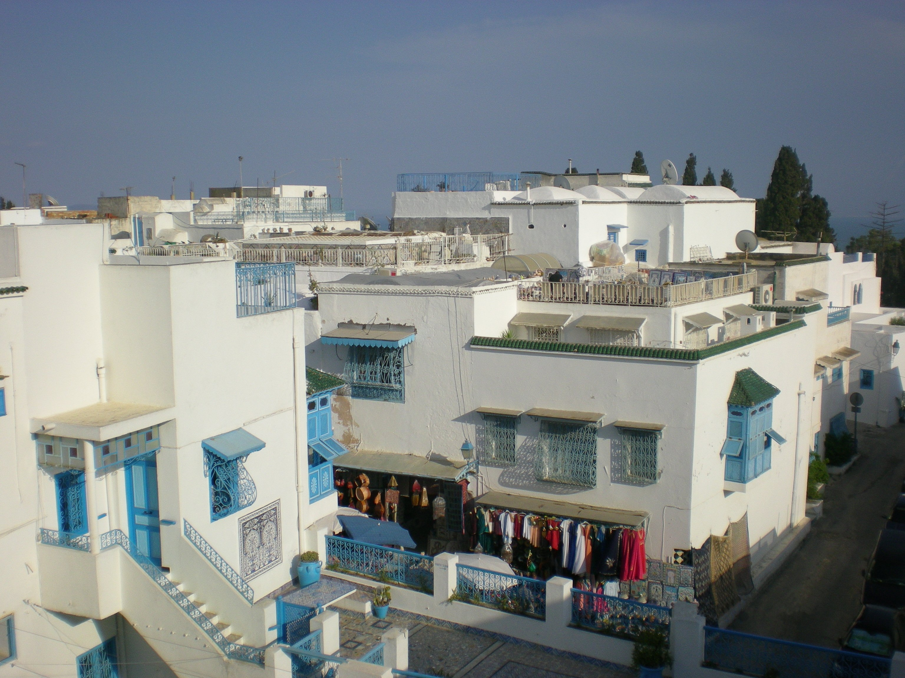 Terraces in Sidi Bou Said, Tunisia